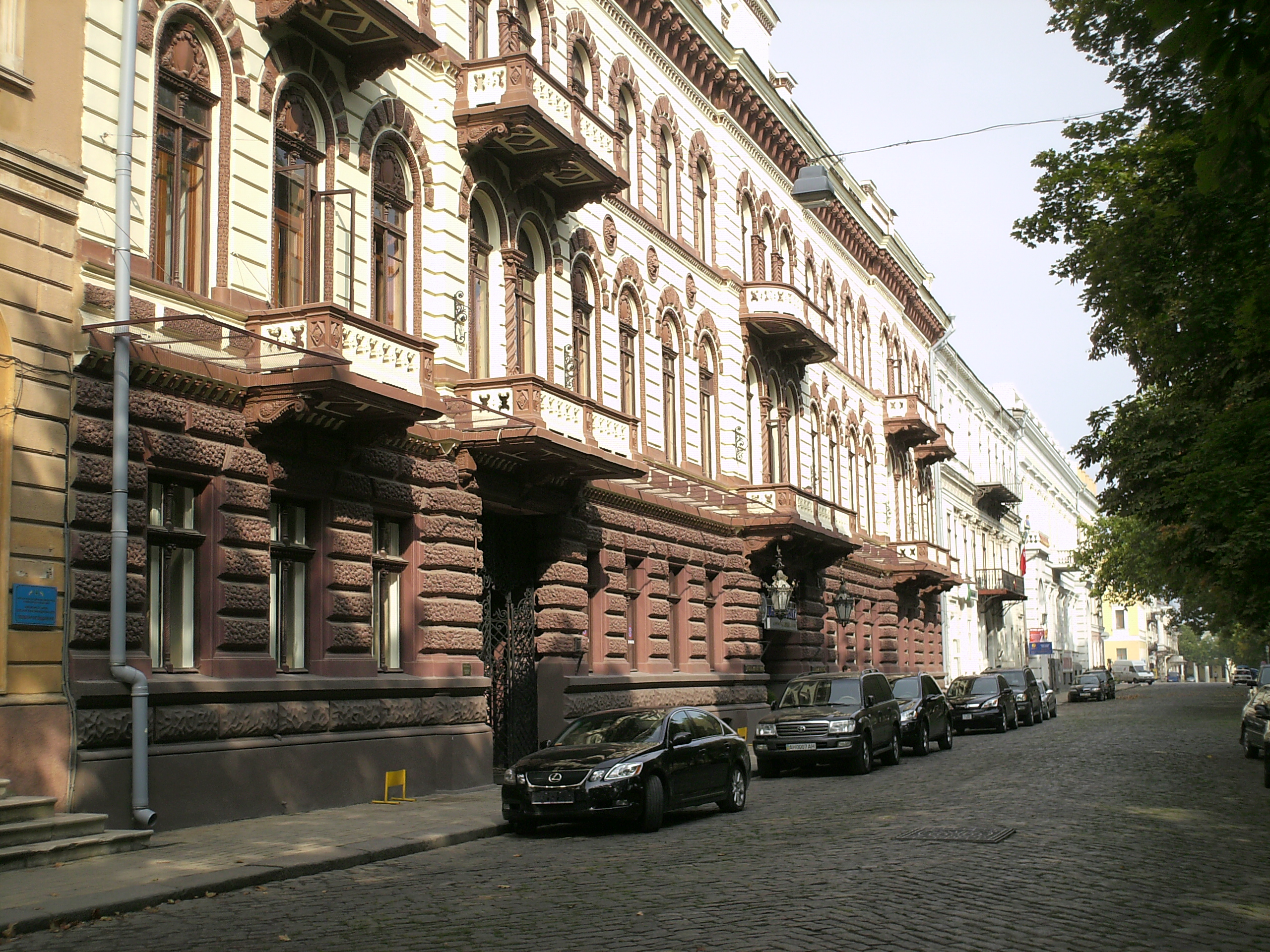 Беларуская (тарашкевіца): Прыморскі бульвар.